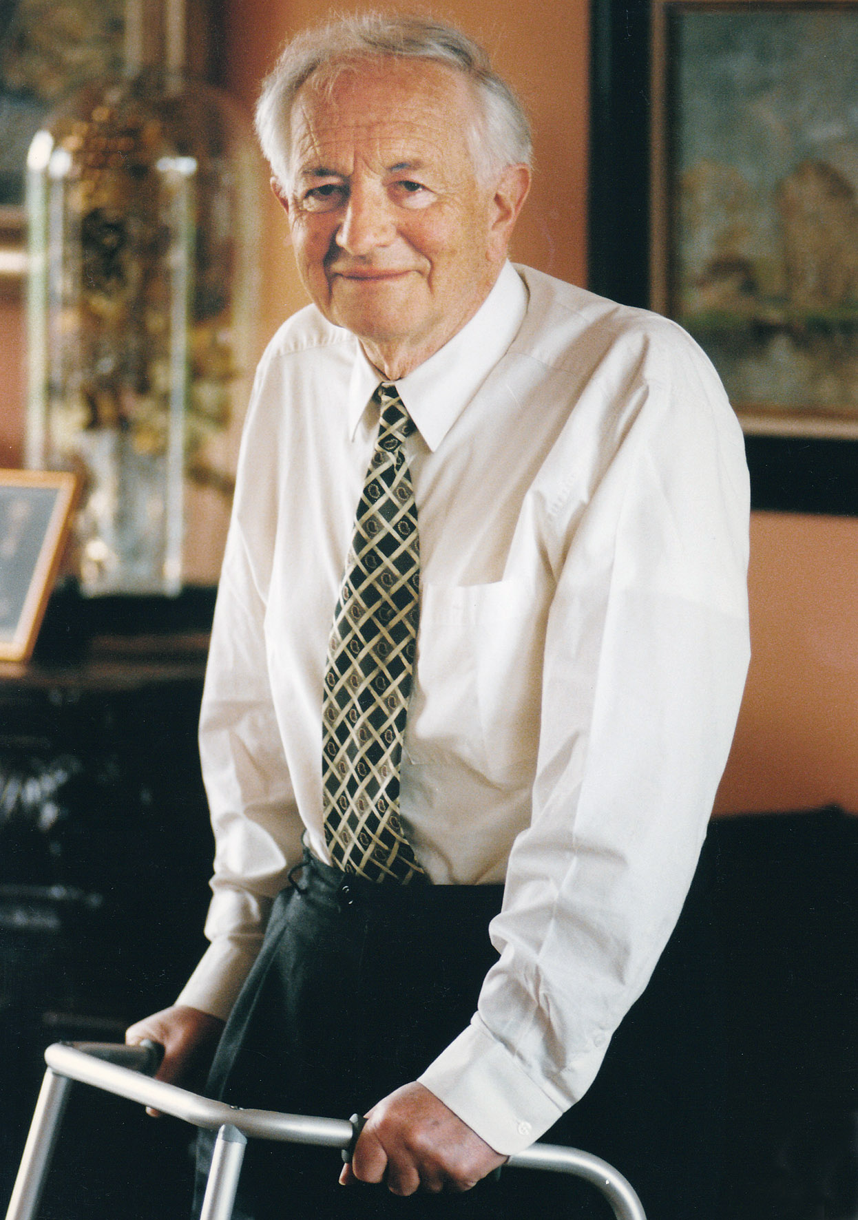 Maurits Coppieters, Belgisch politicus, Volksunie